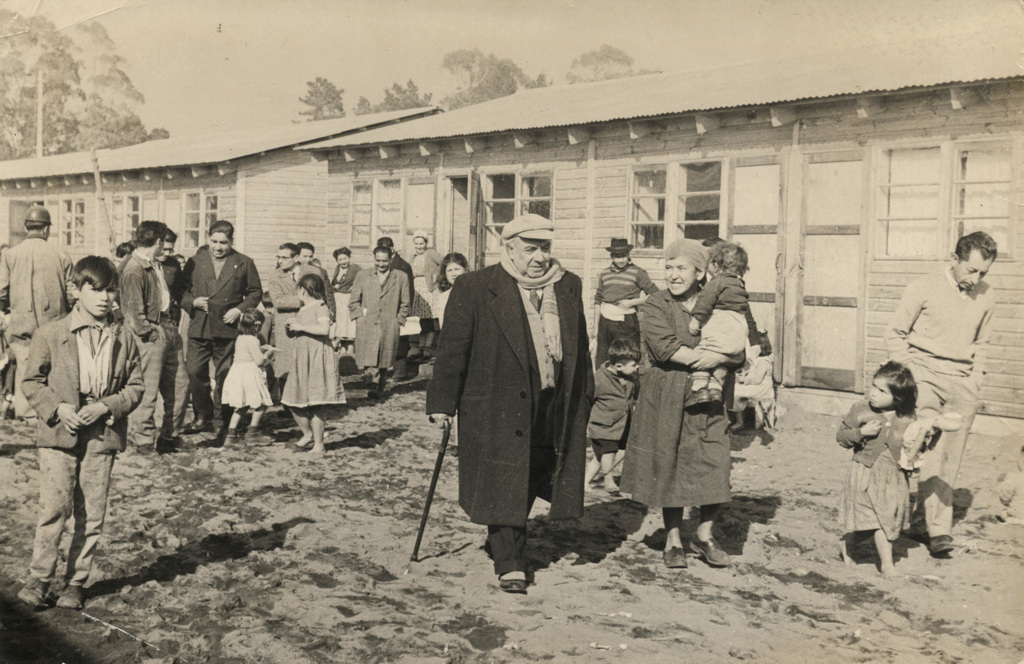 Elías Lafertte caminando por una población rodeado de personas.